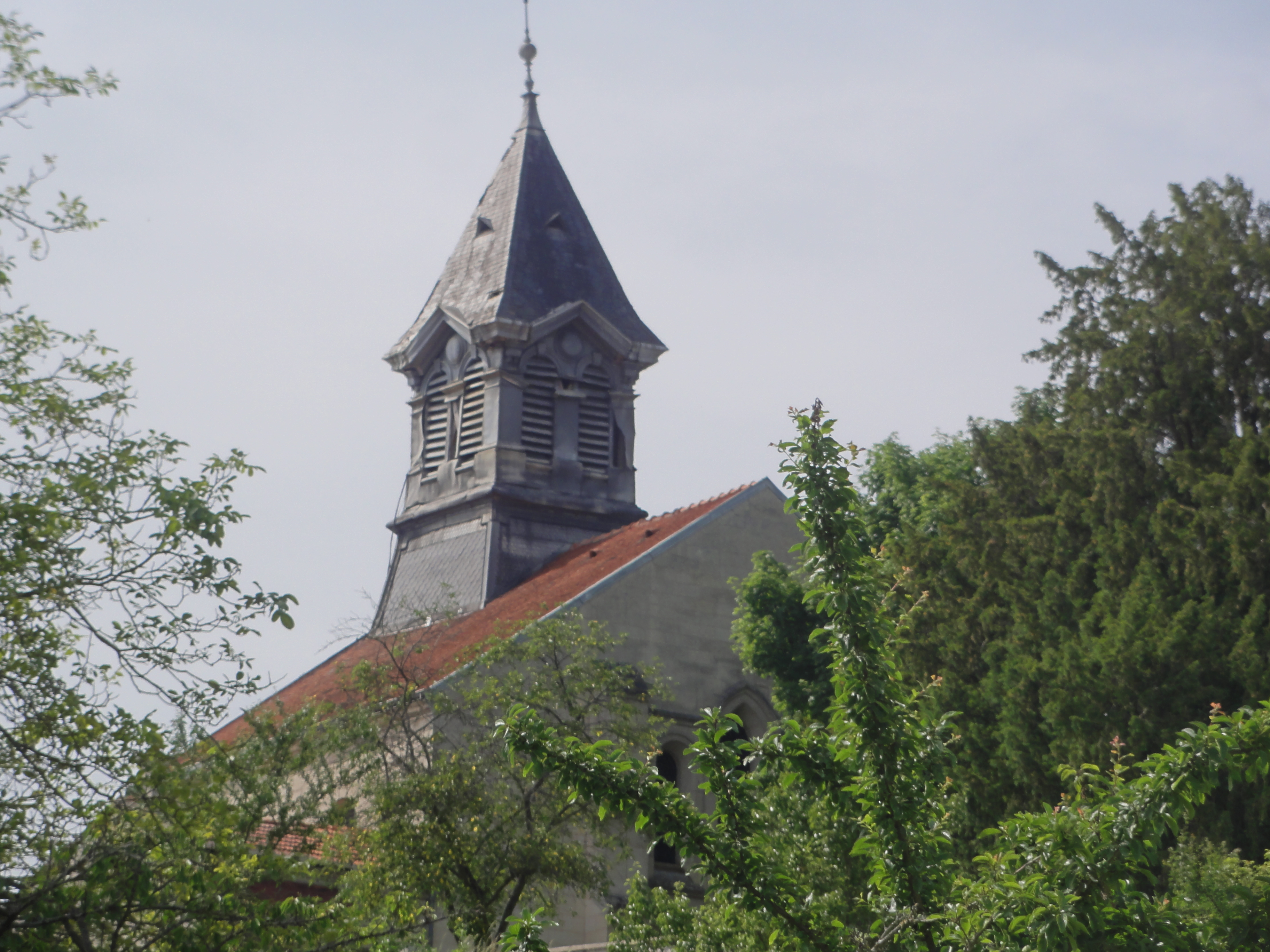 Celles-sur-Aisne (Aisne) Église, vue de loin